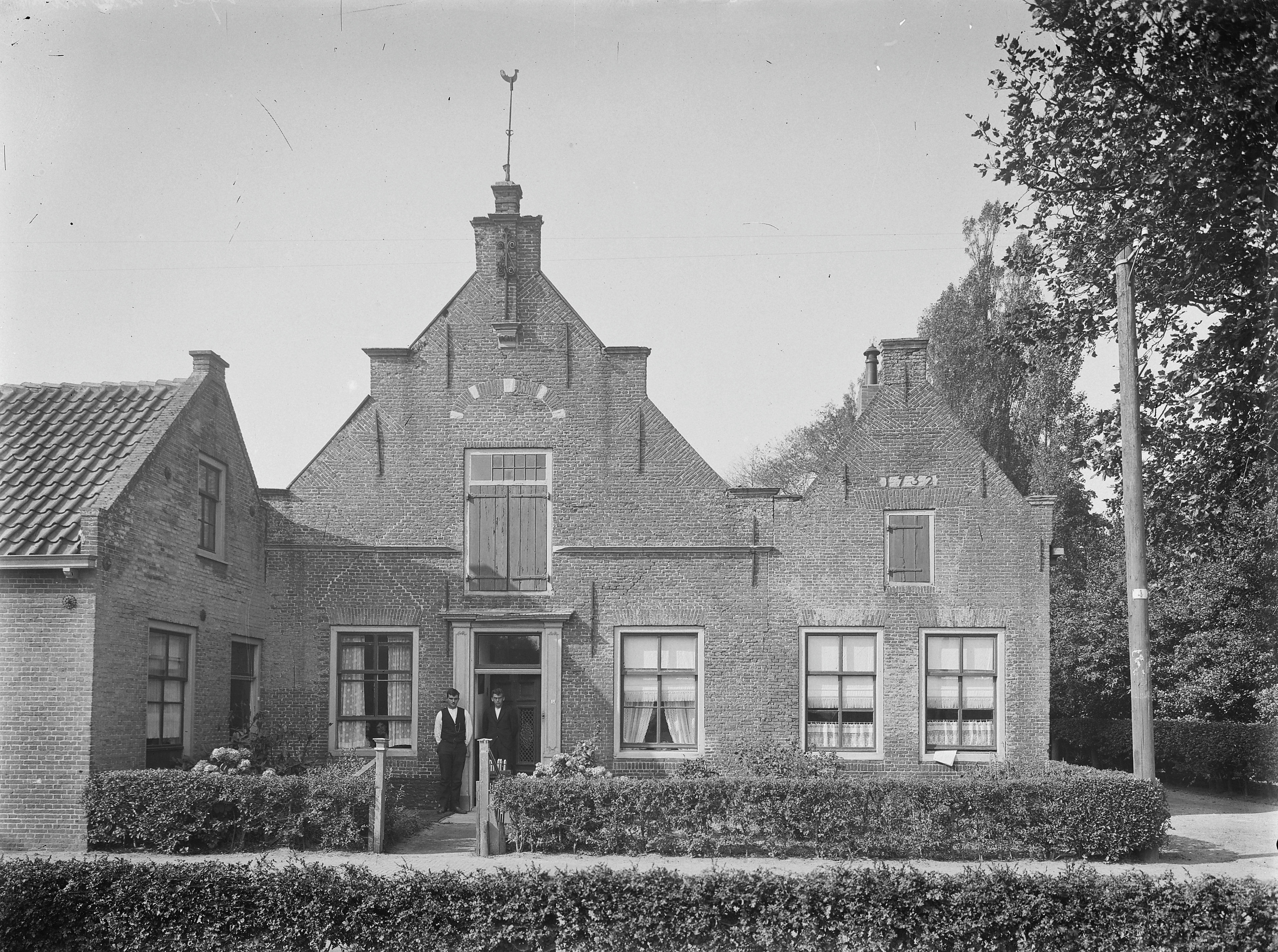 Voorgevels van de drie huisjes, het zo geheten Jan Steenhuis (opmerking: In: Buiten: 16(1922), nr. 5, p. 60)